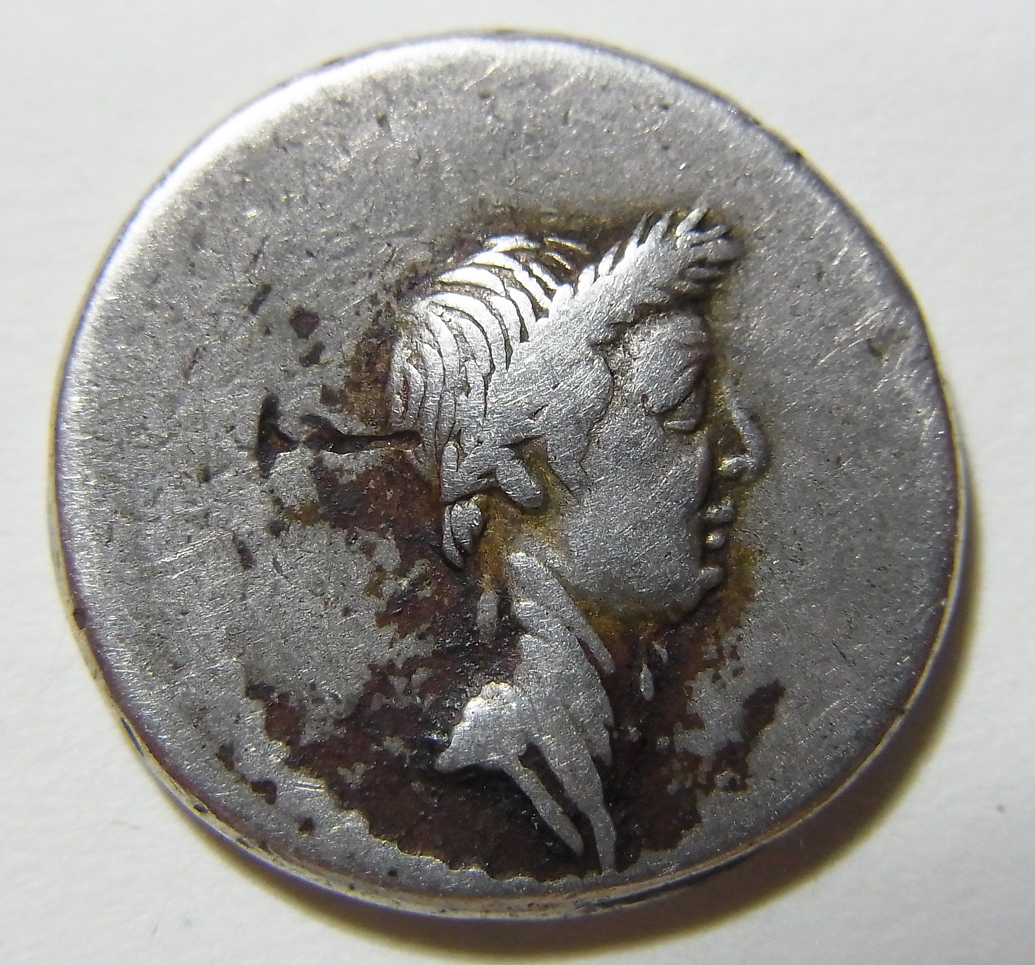 ユリウス・カエサルの暗殺後、紀元前44年前後に発行されたディナリウス銀貨